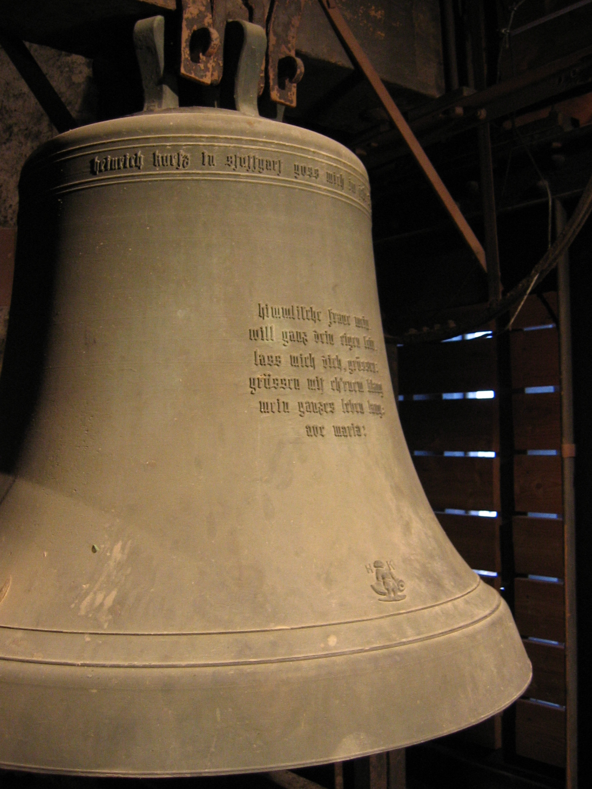 Inschrift auf der Marienglocke an St. Bernhard zu Karlsruhe.